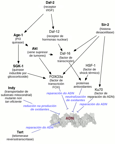 Os xenes que máis inflúen na duración da vida afectan á taxa de danos no ADN